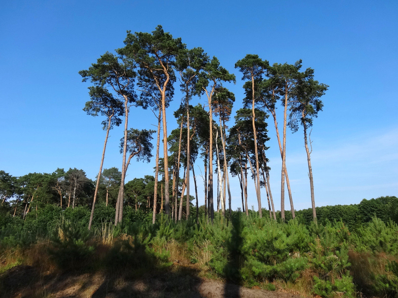 Puszcza Bydgoska w okolicy Białych Błót